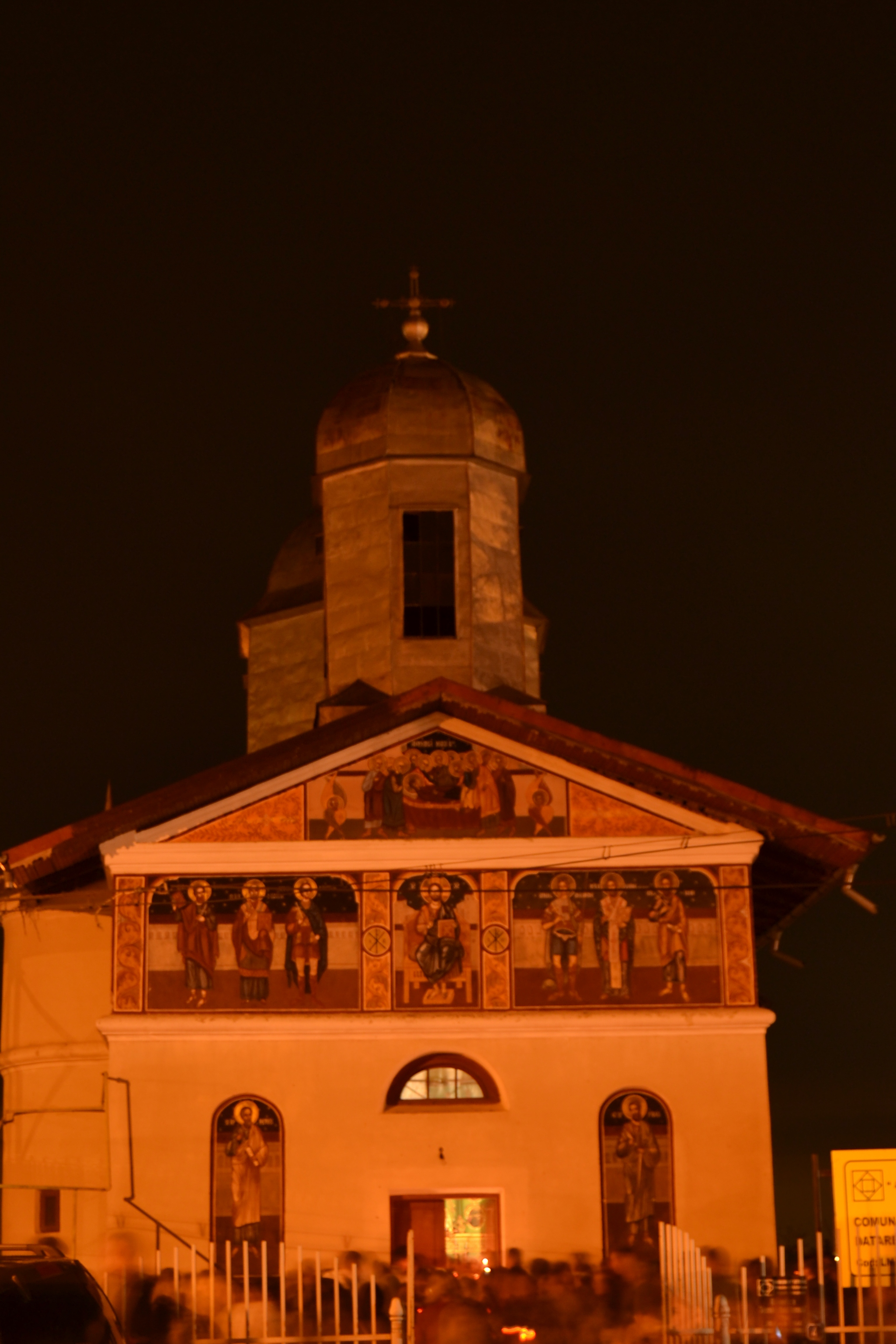 Biserica "Adormirea Maicii Domnului", Comuna Potlogi, sat Pitaru